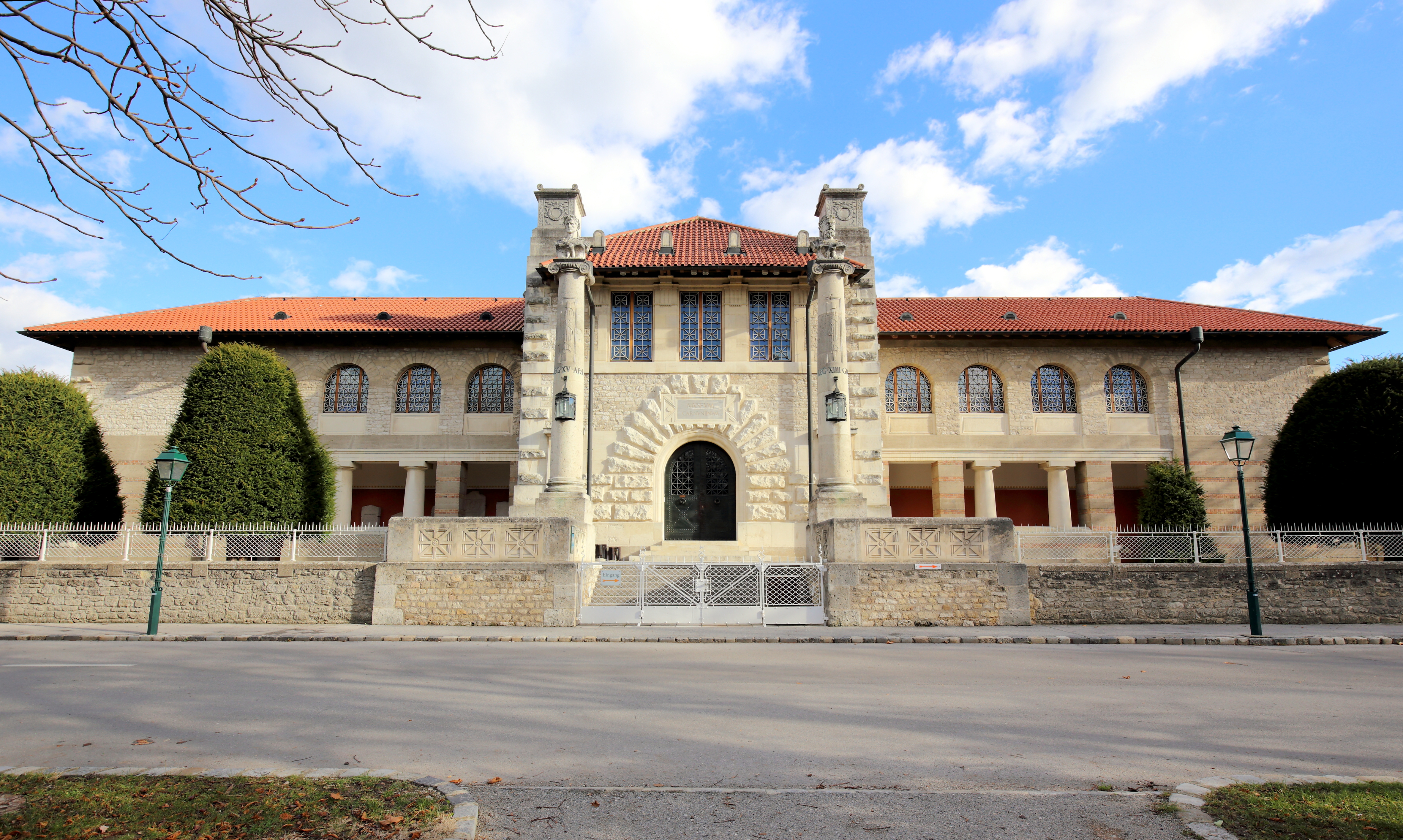 Museum Carnuntinum in der niederösterreichischen Marktgemeinde Bad Deutsch-Altenburg.Nachdem im 19. Jahrhundert der wohl größte und bedeutendste römische Siedlungsraum auf österreichischem Boden erforscht wurde (1875 Entdeckung der Bäderanlage südlich von Deutsch-Altenburg, 1887 das Amphitheater und 1898 bis 1911 das römische Legionslager) wurde von 1901 bis 1904 nach den Plänen der Architekten Friedrich Ohmann und August Kirstein im Stil einer römischen Villa rustica das zweigeschossige Museumgebäude errichtet und am 27. Mai 1904 von Kaiser Franz Joseph eröffnet wurde. Es ist von einer Umfassungsmauer aus Bruchsteinen mit Pfeilerverstärkung und runden Ecktürmen umgeben. An einem dreiachsigen Mittelrisalit schließen sich seitlich Flügelbauten mit rundbogigen Obergeschoßfenstern an. Der Stiegenaufgang wird von zwei freistehenden Säulen mit den Büsten der römischen Kaiser Augustus und Marc Aurel flankiert und tragen die Inschrift „Leg. XIV“ sowie „Leg. XV“.Von 1988 bis 1992 erfolgte eine umfangreiche Sanierung durch den Architekten Hans Puchhammer.